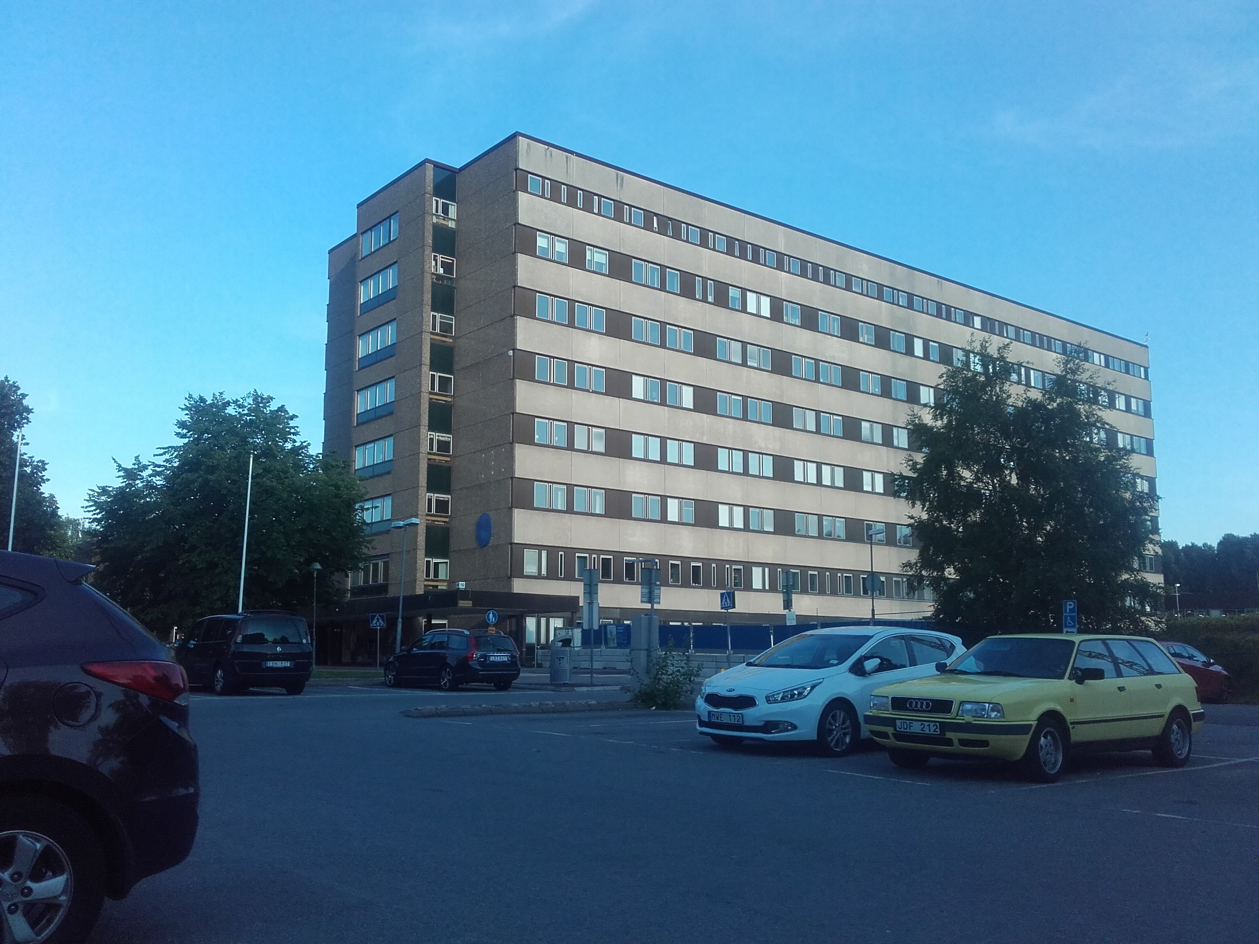 Barnkliniken på Östra Sjukhuset i Göteborg